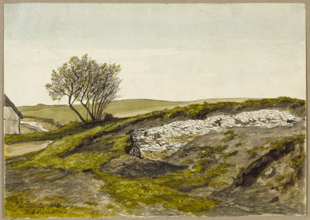 Akvarel af A.P. Madsen 1860. Affaldsdynge, Fannerup, Ginnerup sogn.